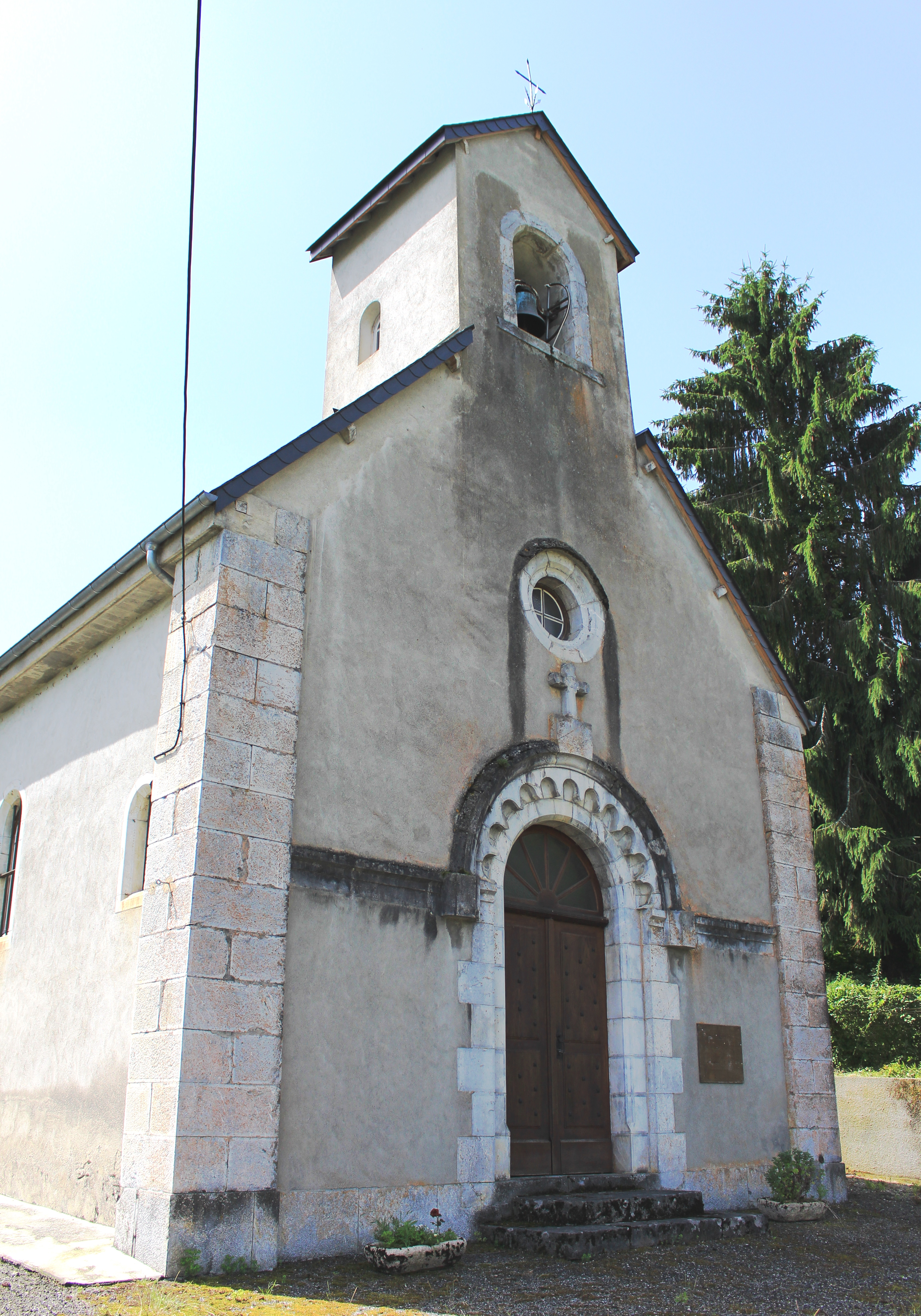 Église Martyre de-Saint-Jean-Baptiste de Mazouau (Hautes-Pyrénées)